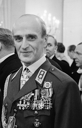 Suomalainen jalkaväenkenraali ja Mannerheim-ristin ritari numero 162 Adolf Ehrnrooth (1905-2004) 6.12.1963 Itsenäisyyspäivän vastaanotolla.